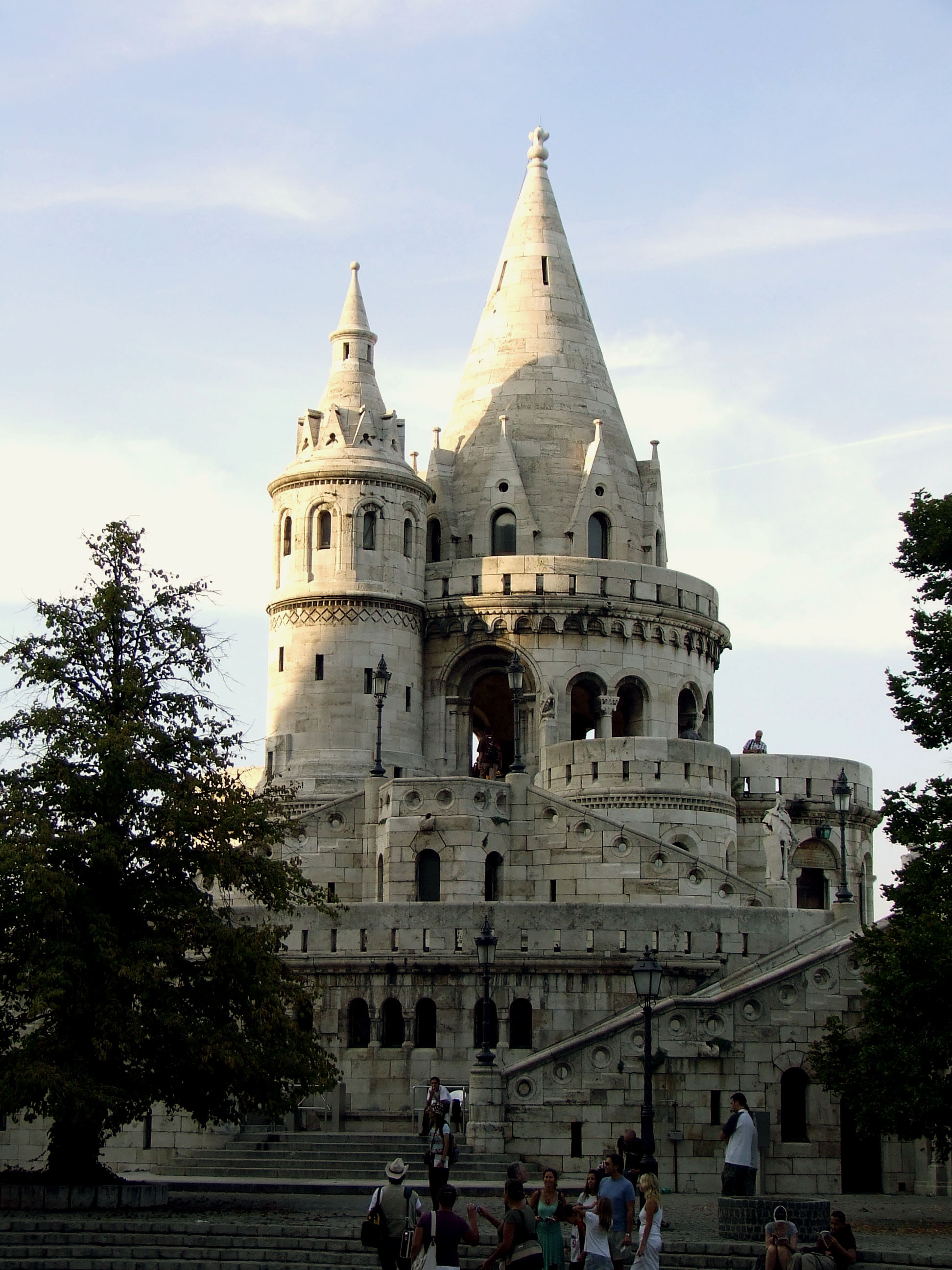 eden od stolpičev gradu Budim v Budimpešti